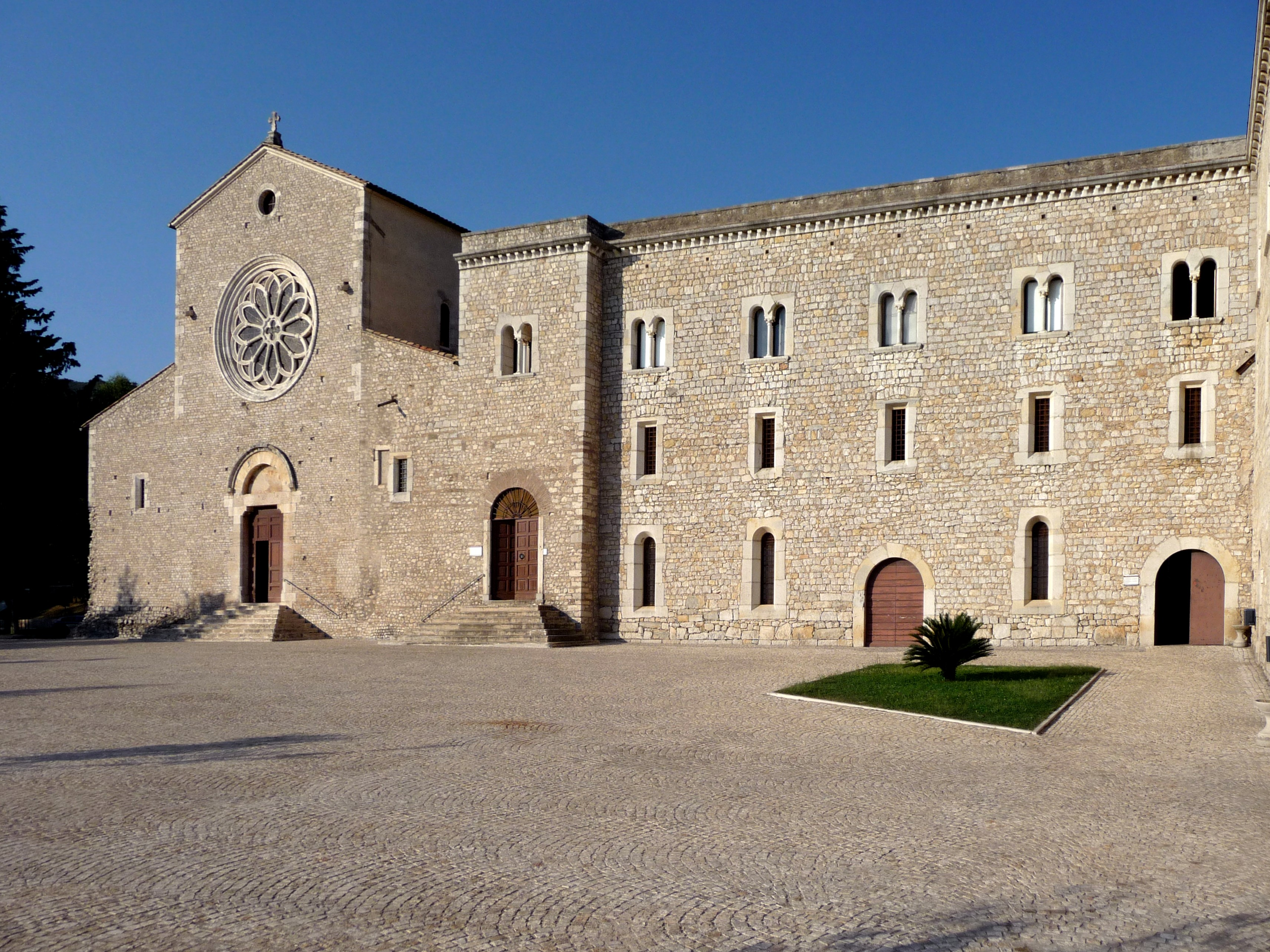 Abbazia